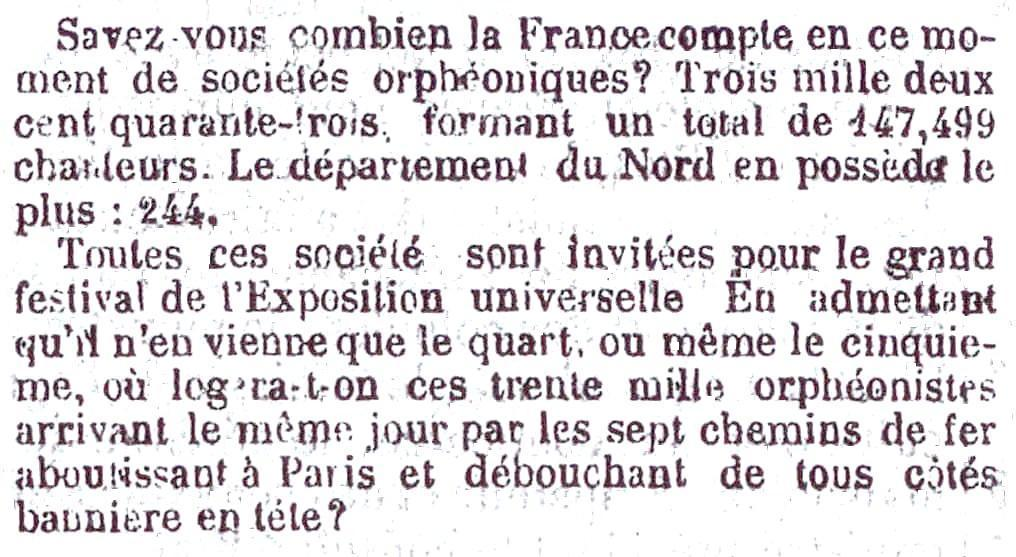 Article donnant le nombre de sociétés orphéoniques en France en 1867.